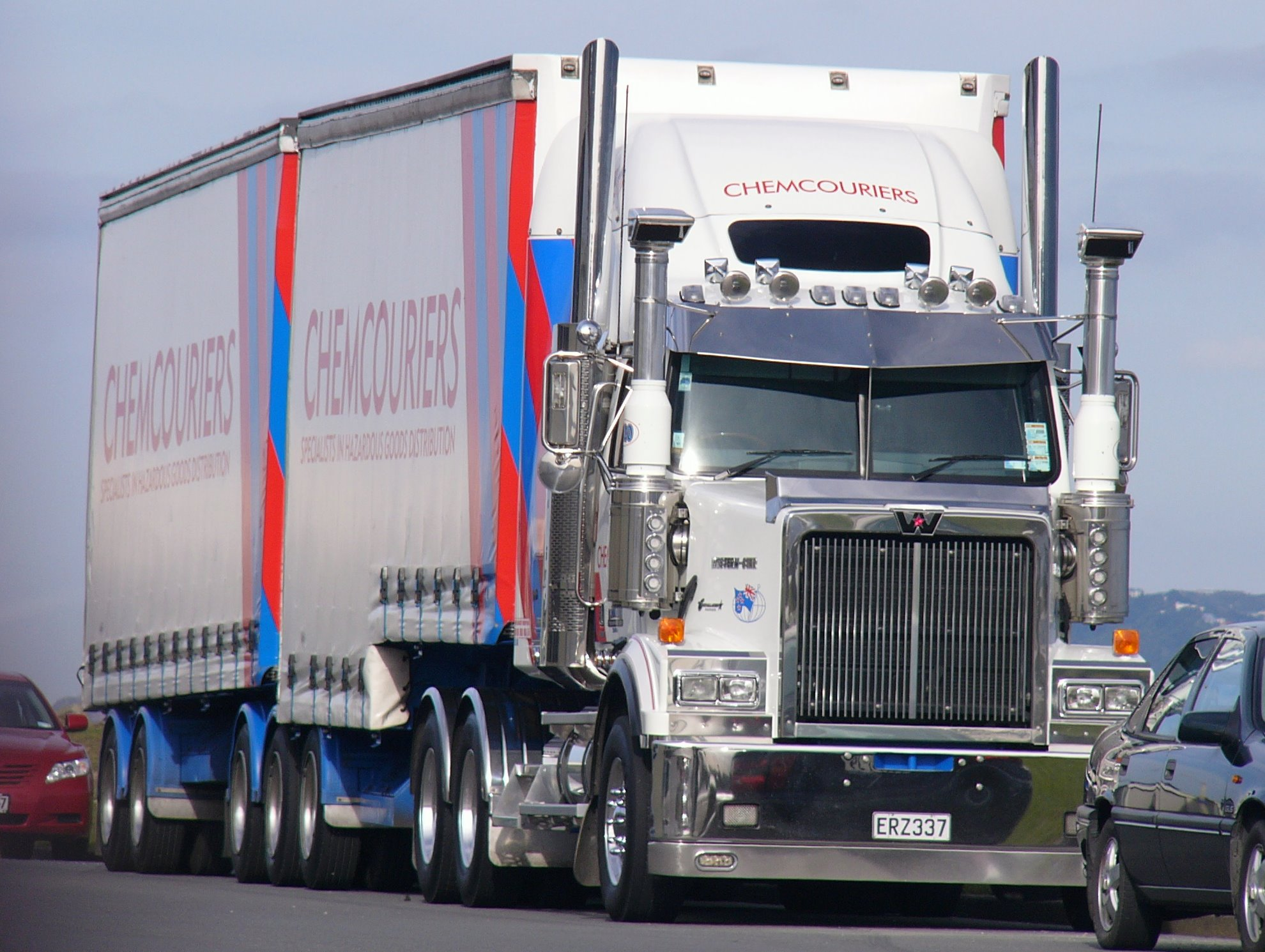 2008 Western Star 4864FX